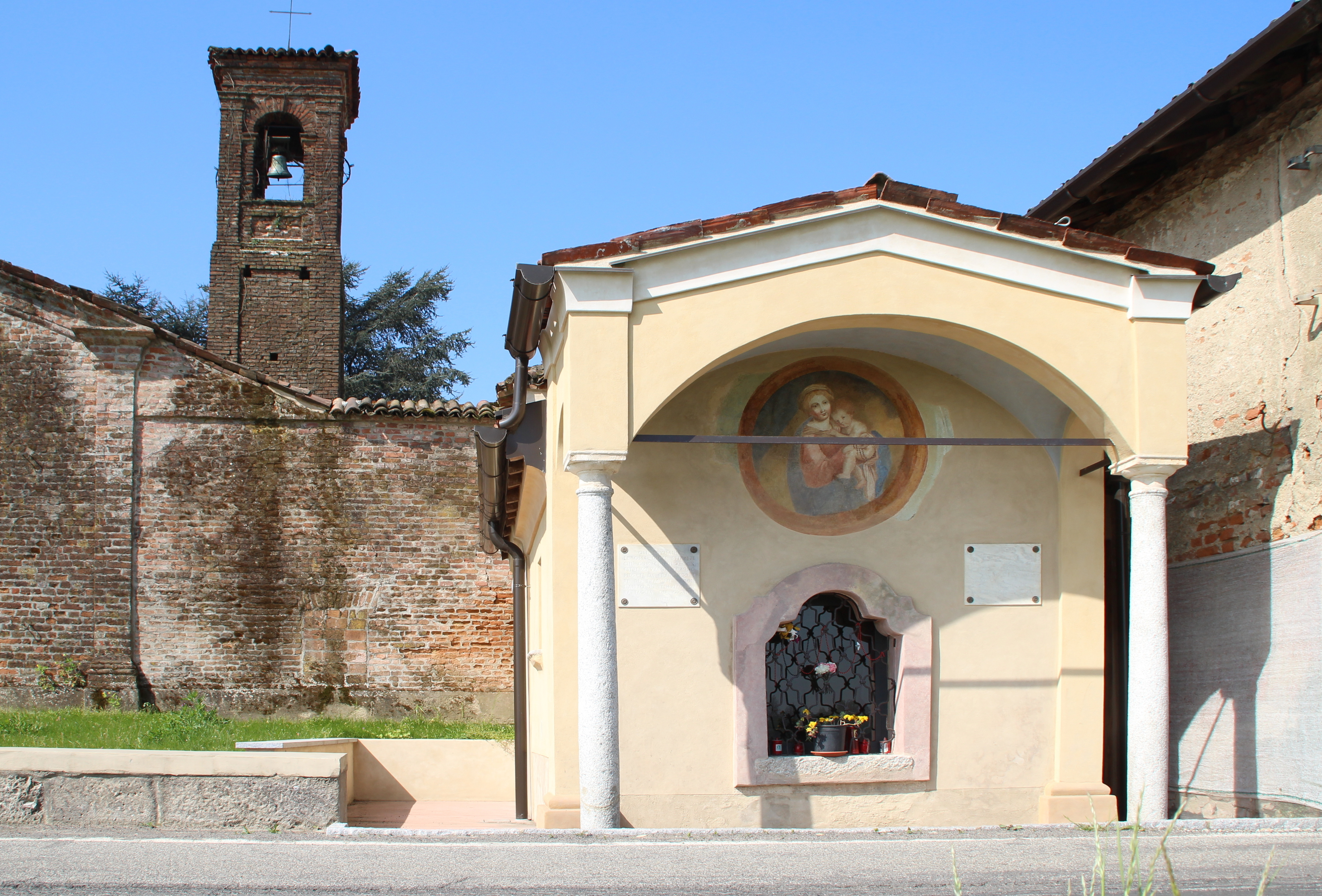 Ossario Santa Maria della Neve Beinhaus bei Mezzano